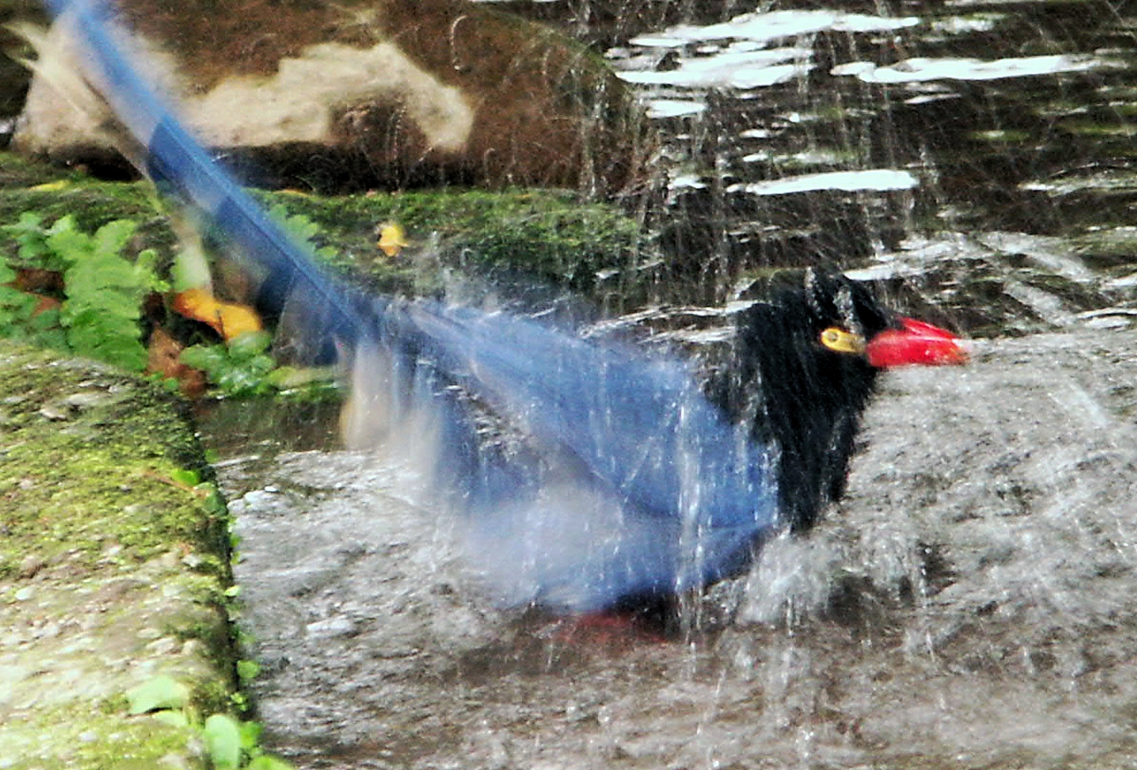 台灣藍鵲 Taiwan Blue Magpie (Urocissa caerulea)